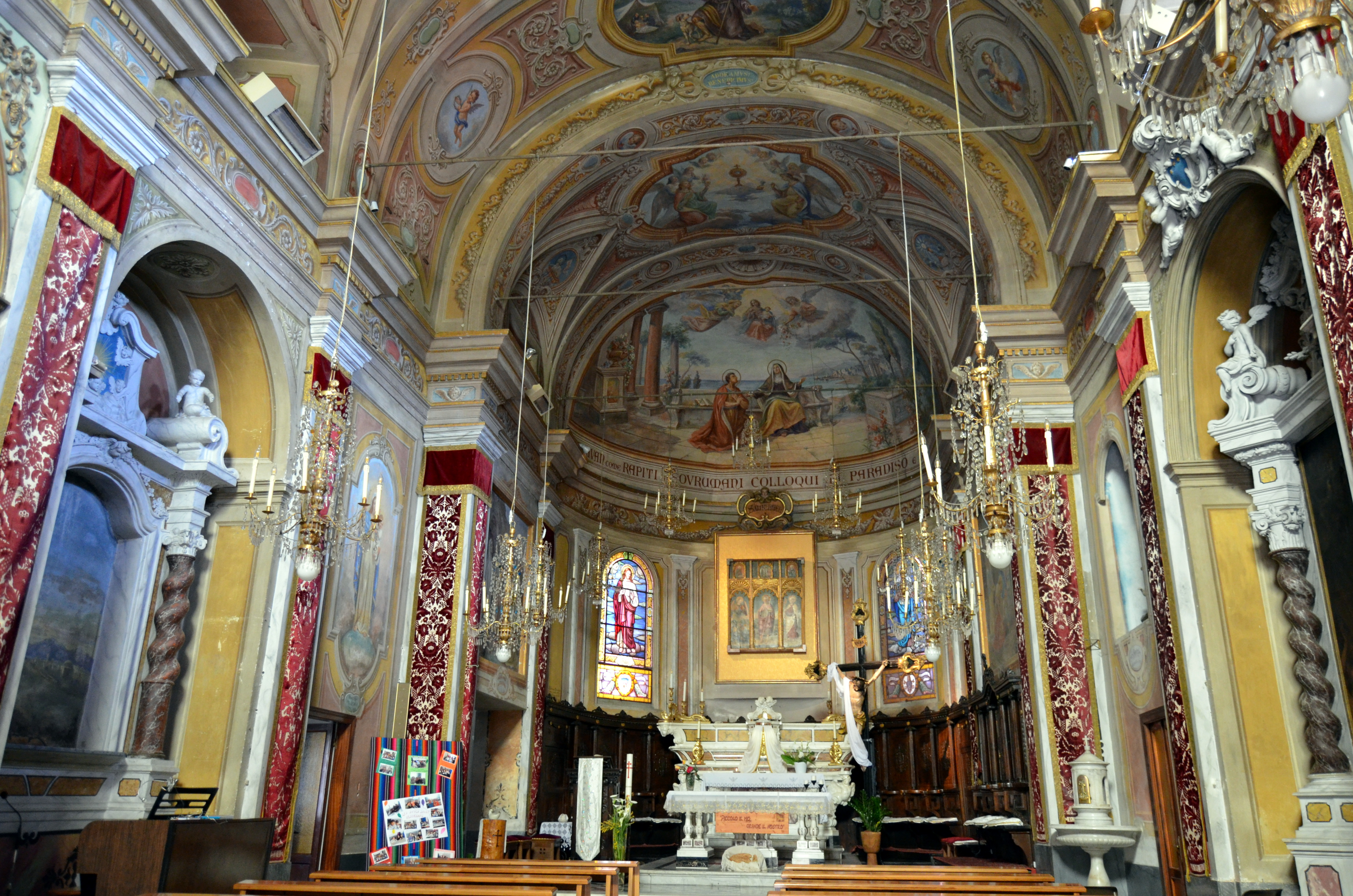 La navata centrale della chiesa di San Michele Arcangelo, Casarza Ligure, Liguria, Italia